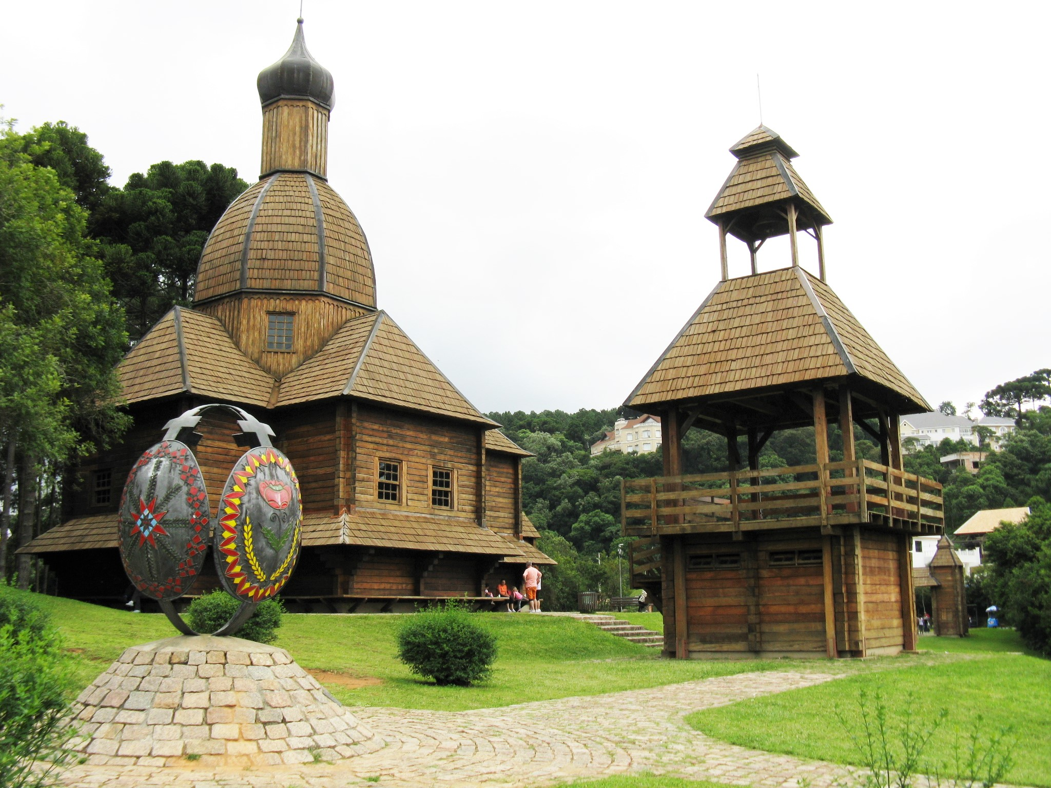 Tingui Park, Curitiba.